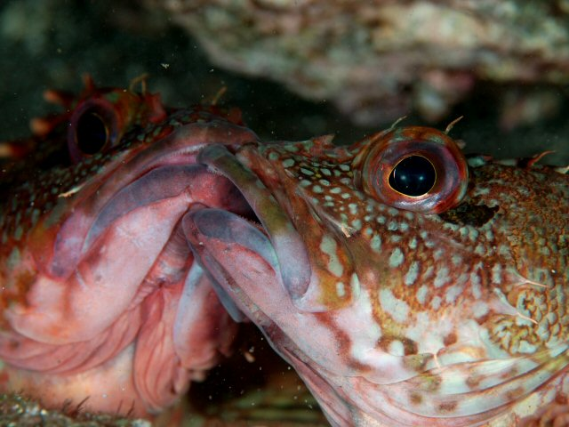 カサゴ Sebastiscus marmoratus